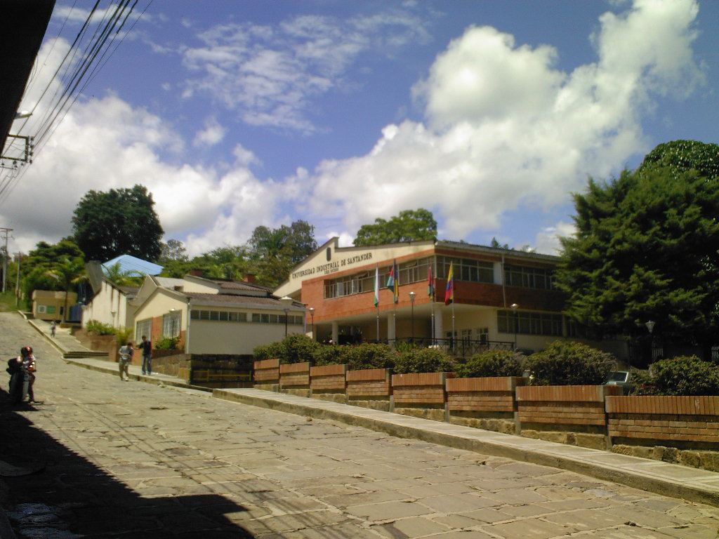 Universidad Industrial de Santander Sede Socorro